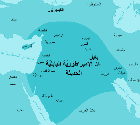 خارطة الإمبراطوريَّة البابليَّة الحديثة.